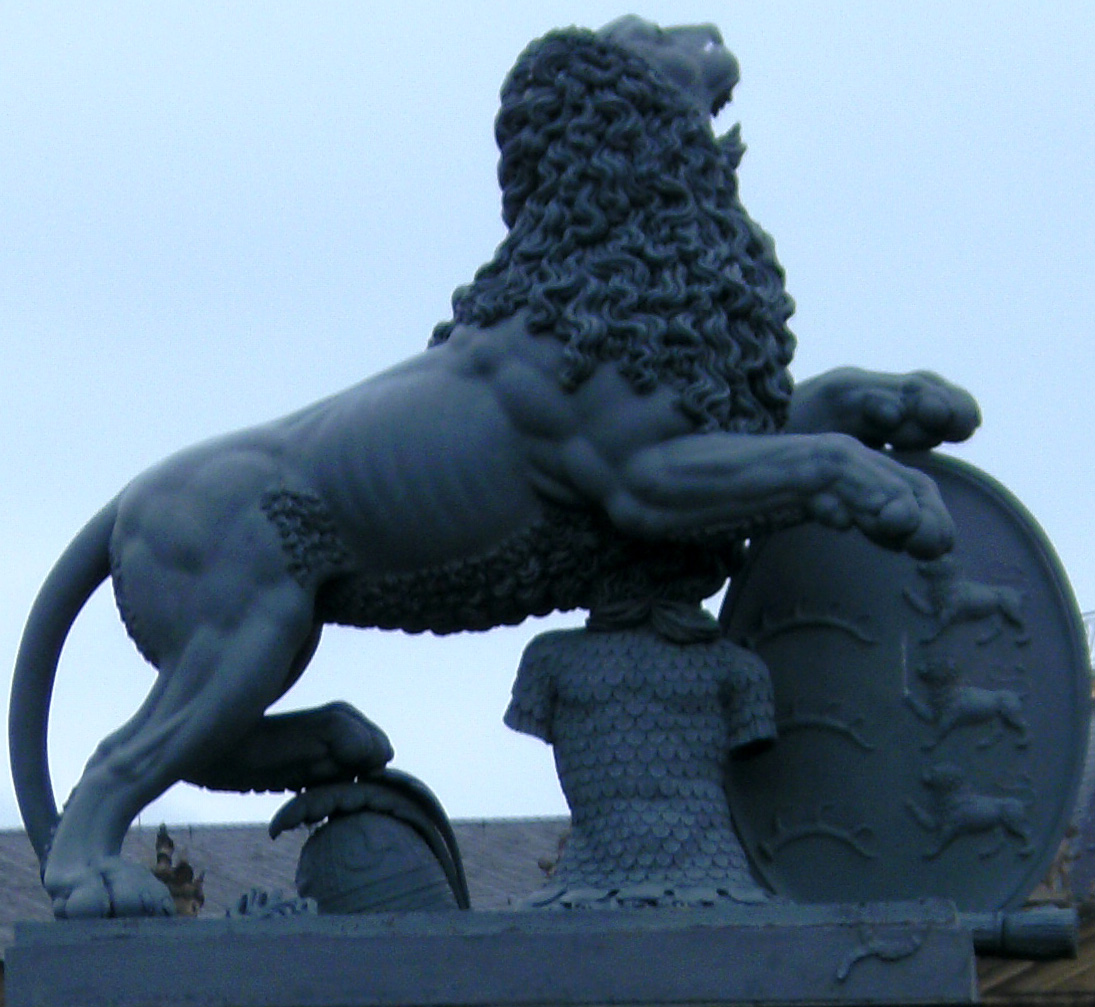 Löwenstatue aus Eisen beim Stuttgarter Neuen Schloss von Antonio Isopi (1758–1833), fertiggestellt 1819